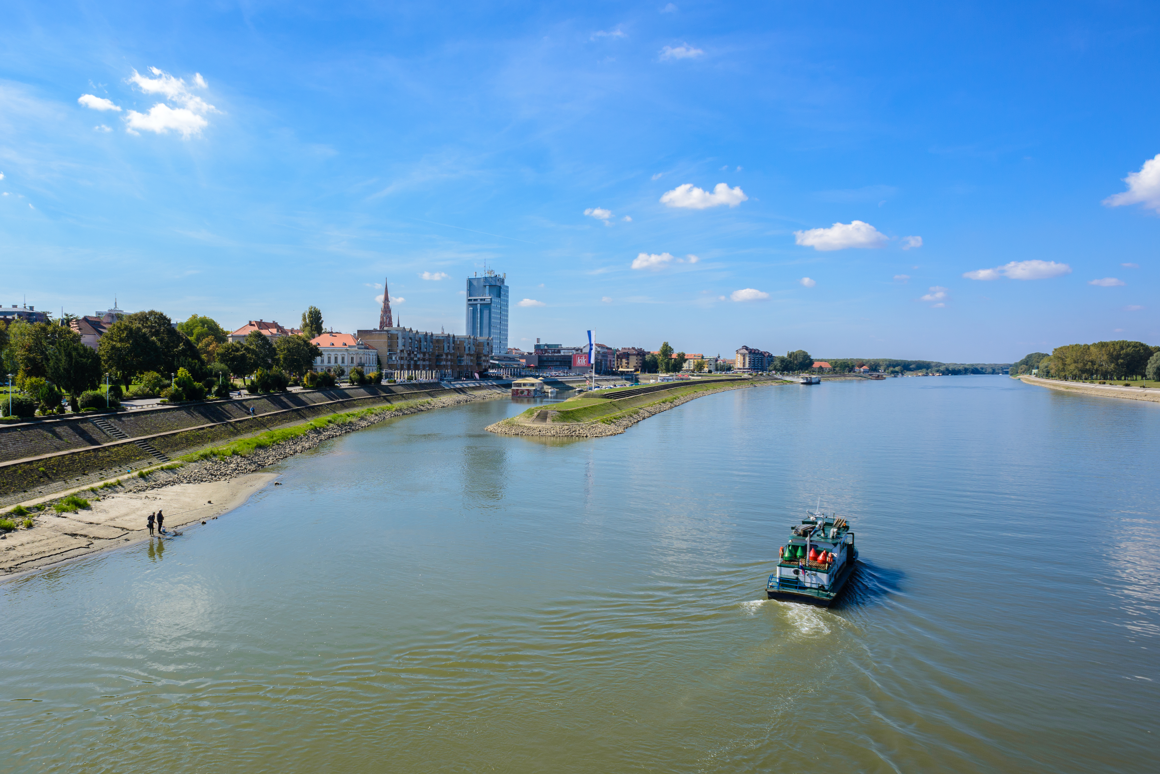 River Drava